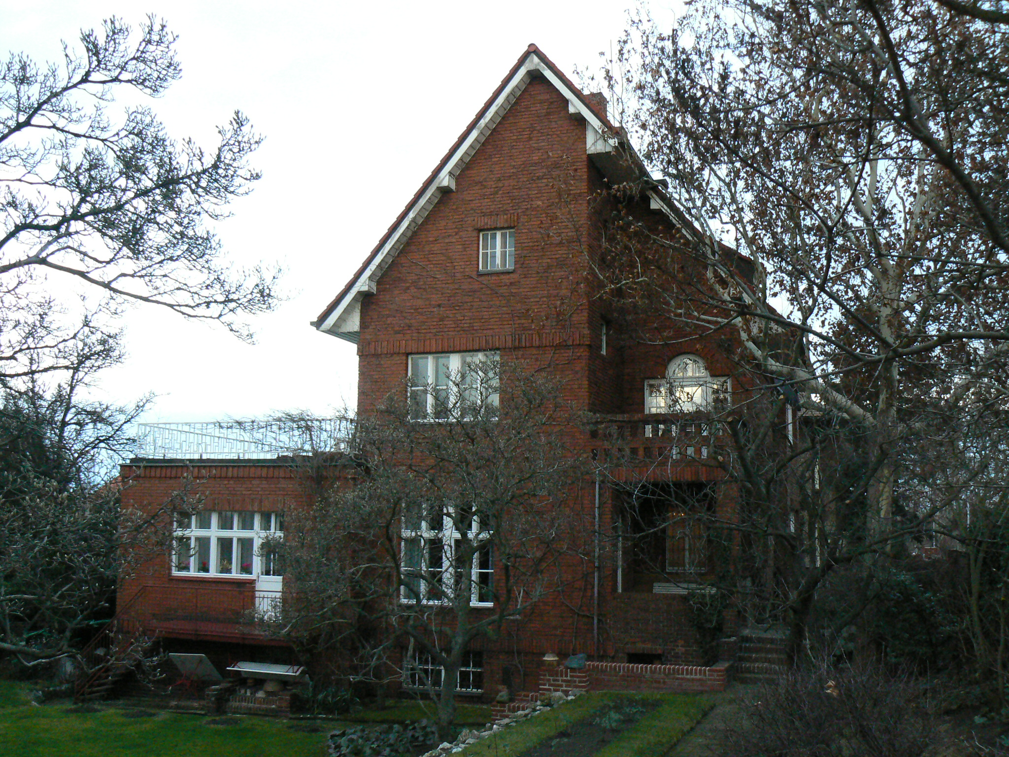 Vila Vincence Beneše postavená Pavlem Janákem ve 23. roce. Dům se nachází v Cukrovarnické ulici 24 na Ořechovce. Fotografie je z ledna 2007